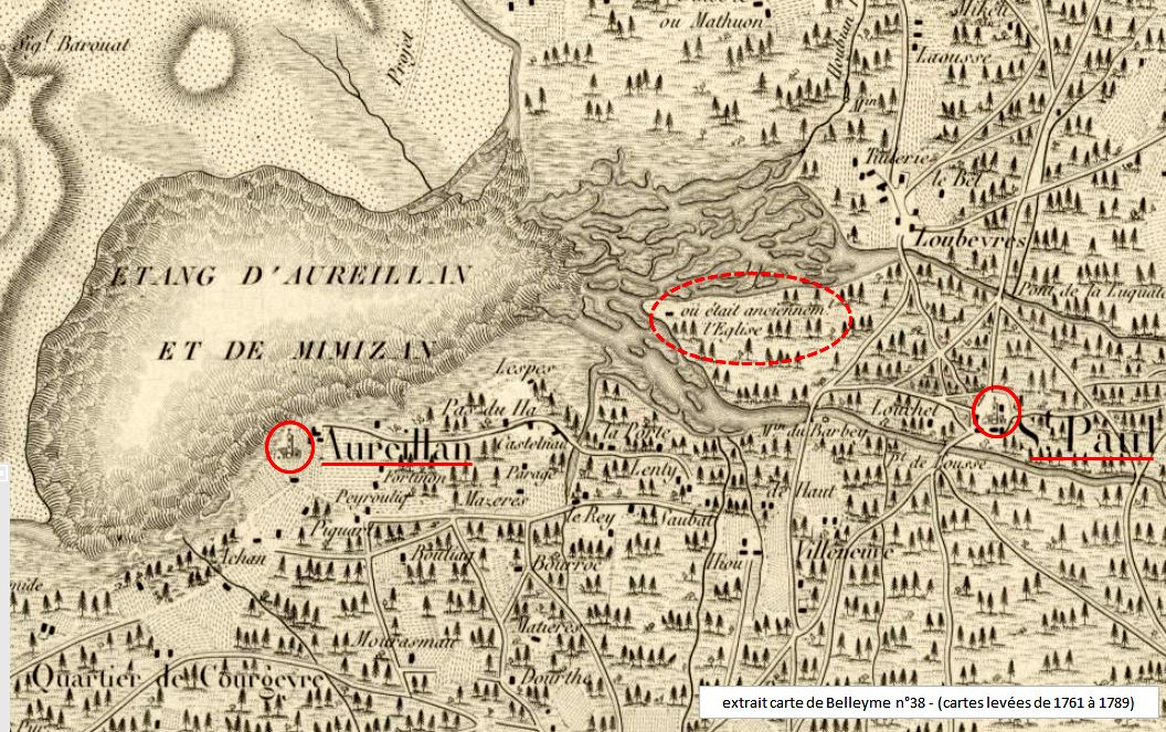 situation de l'ancienne église de Saint-Paul